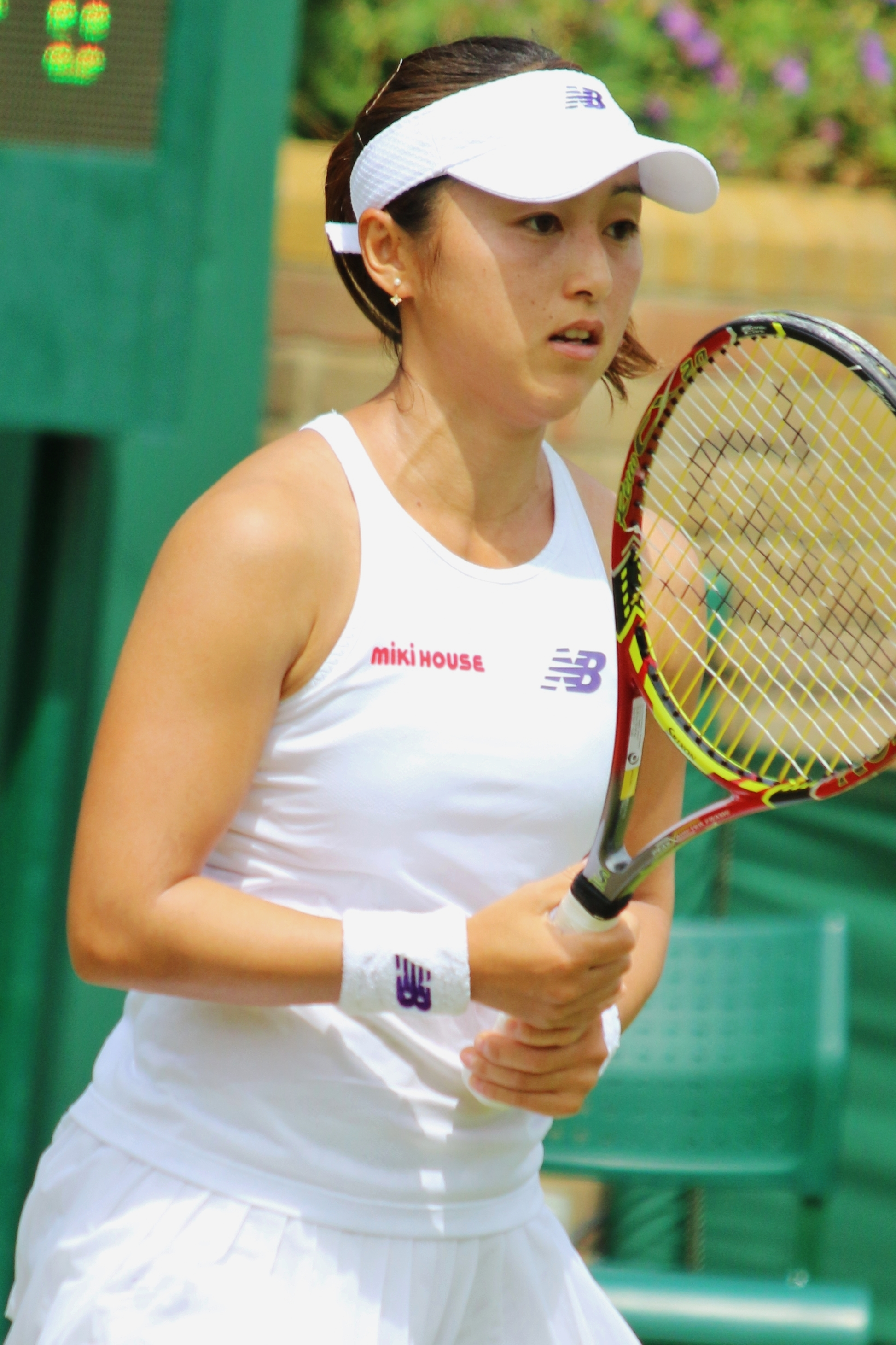 Doi WM17 (11)